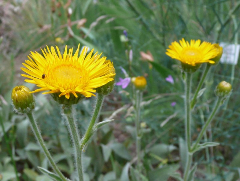 Botanischer Garten Erlangen, 2008